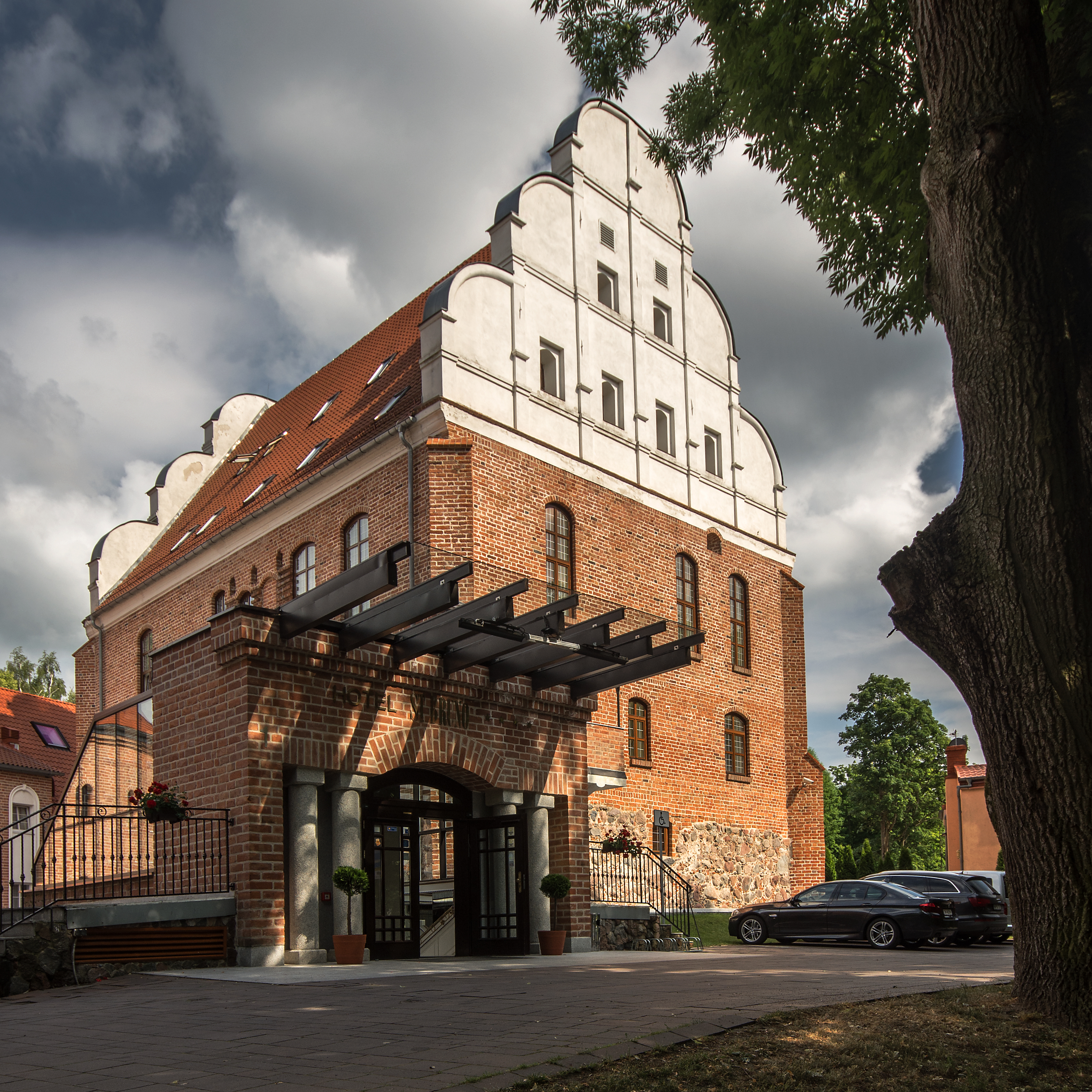 Giżycko, zamek zakonny - zachowane skrzydło, XIV - 2 poł. XIX Wikidata has entry 645478 with data related to this item.